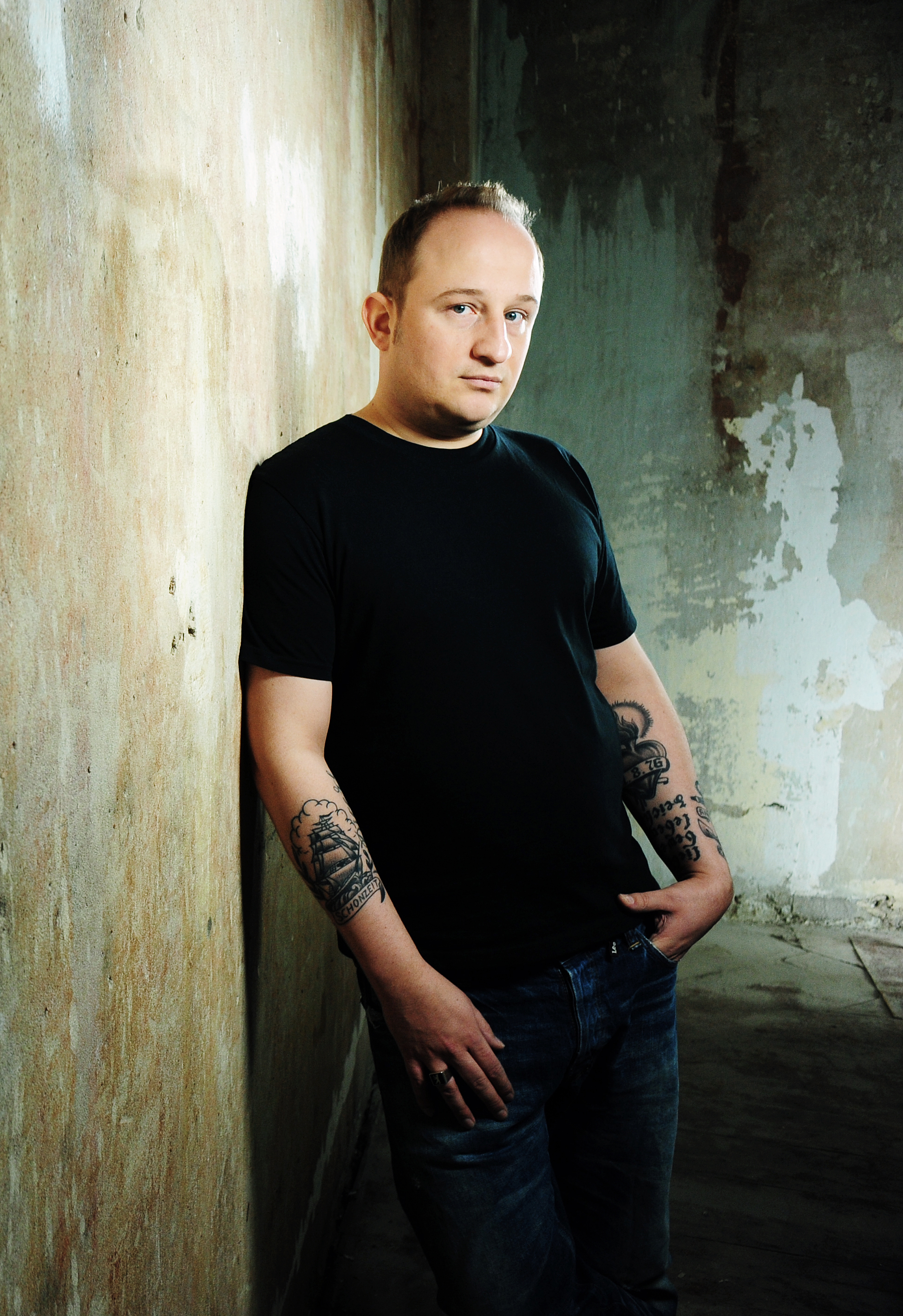 Philip Simon fotografiert von Urban Ruths.